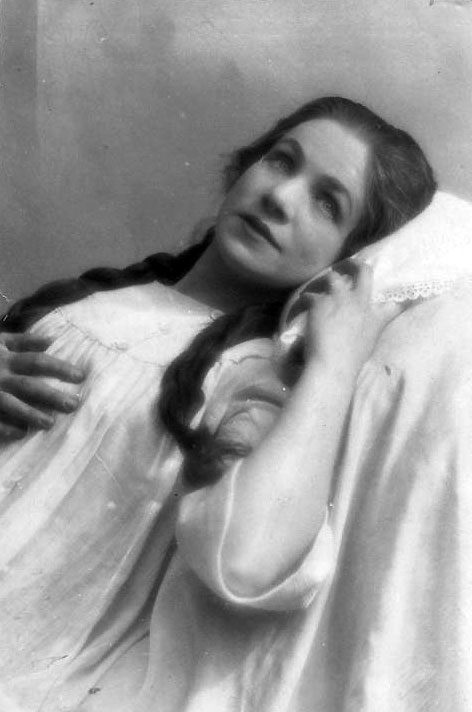 Maria Schildknecht